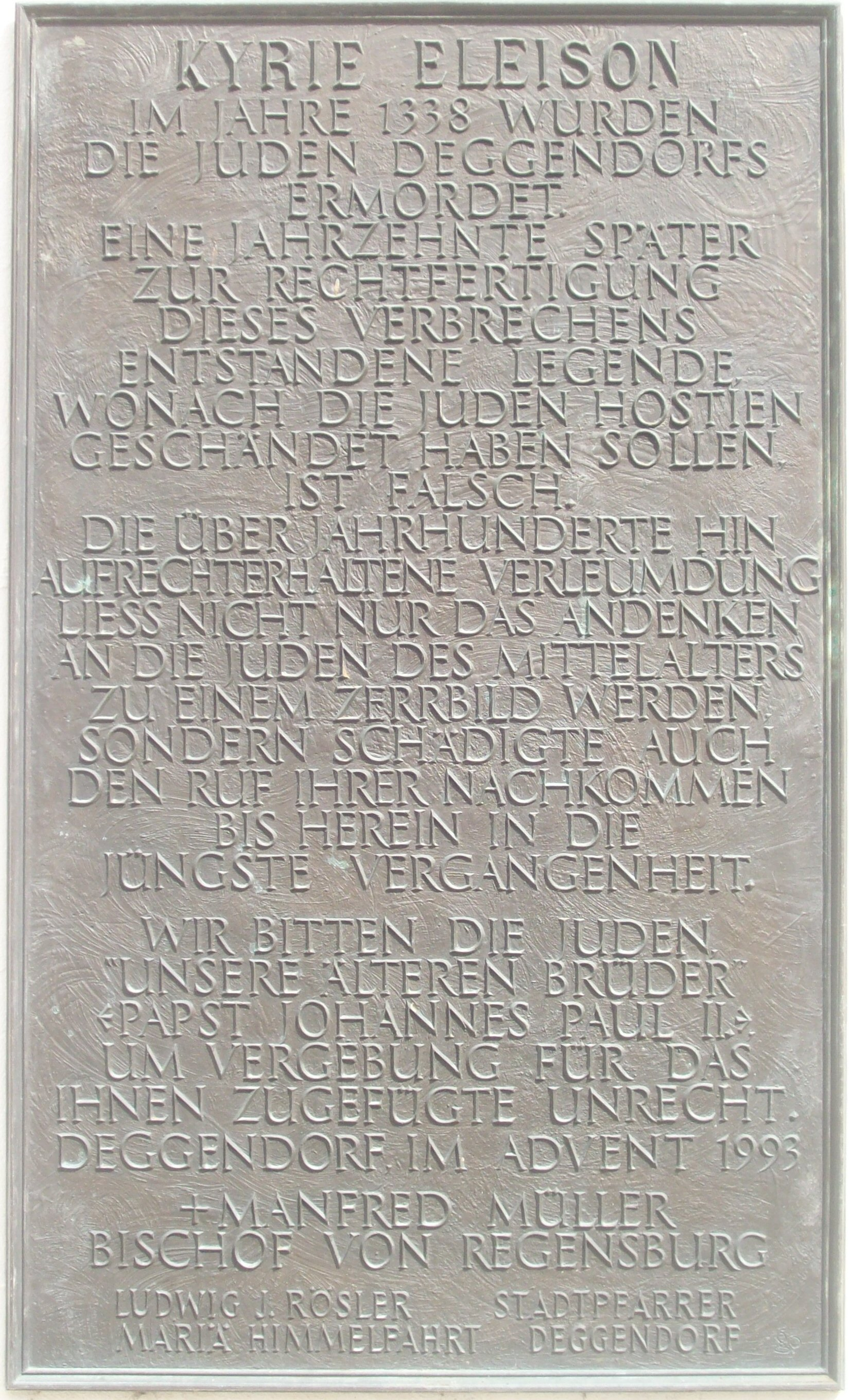 Grabkirche Deggendorf, Ausseninschrift, 1993, zu den Judenpogromen. Anmerkungen:Abschrift: Kyrie Eleison. Im Jahre 1338 wurden die Juden Deggendorfs ermordet. Eine Jahrzehnte später zur Rechtfertigung dieses Verbrechens entstandene Legende, wonach die Juden Hostien geschändet haben sollen, ist falsch. Die über Jahrhunderte hin aufrechterhaltene Verleumdung liess nicht nur das Andenken an die Juden des Mittelalters zu einem Zerrbild werden, sondern schädigte auch den Ruf ihrer Nachkommen bis hinein in die jüngste Vergangenheit. Wir bitten die Juden, "unsere älteren Brüder" (Papst Johannes Paul II.), um Vergebung für das ihnen zugefügte Unrecht. Deggendorf im Advent 1993. Manfred Müller, Bischof von Regensburg. Ludwig J. Rösler, Stadtpfarrer Mariä Himmelfahrt Deggendorf.